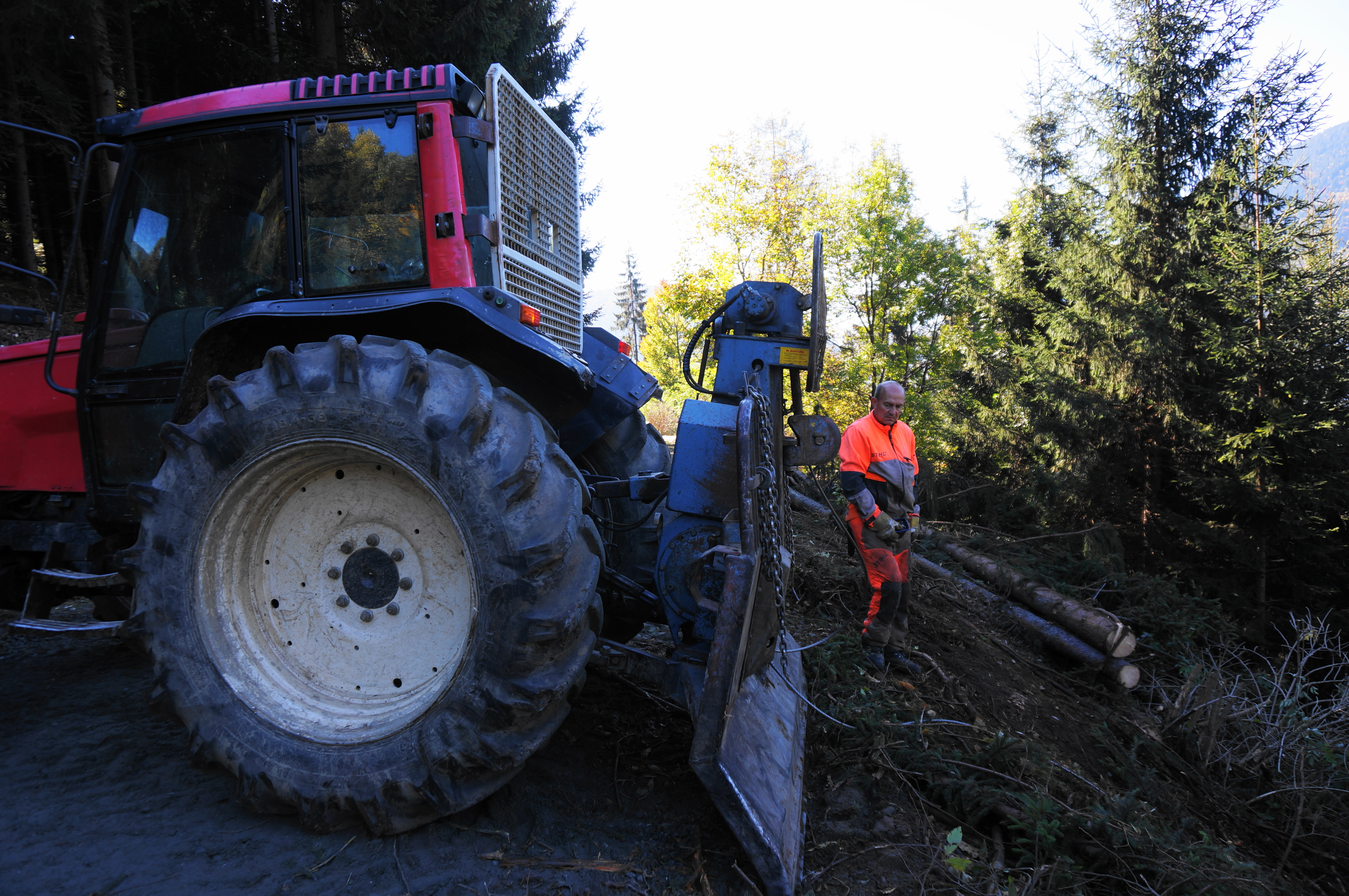 Holzbringung mit Traktor und ferngesteuerter Seilwinde